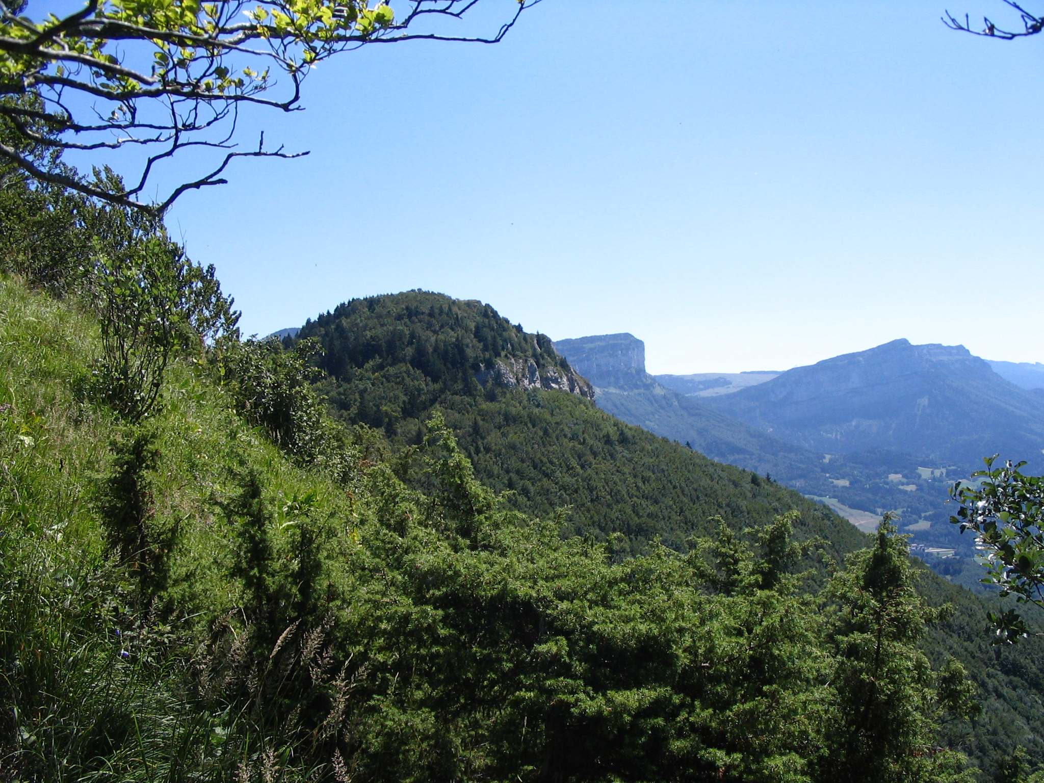 Mont Joigny ( 1556 m )depuis la pointe de la Gorgeat (1485 m )- Entremont-le-Vieux - Massif de la Chartreuse - Savoie.